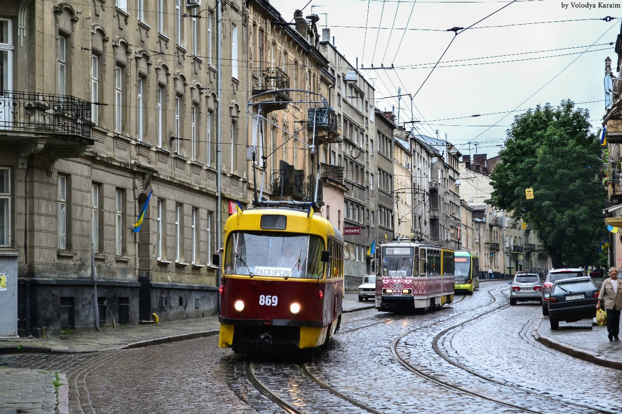 Tatra T4SU 869 на параді трамваїв